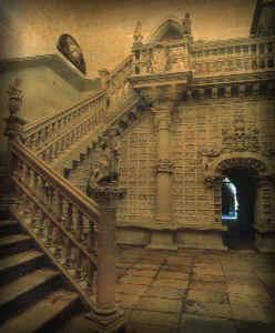 Escalera capitular de Juan de Badajoz "el mozo", catedral de León